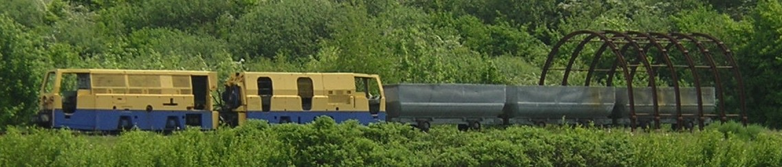 Das Bild zeigt das Denkmal an die Kohlenzeche Sophia-Jacoba der Stadt Hückelhoven, welches an der Autobahnausfahrt der A46 steht. Es ist ein Untertage-Zug mit dem die Bergmänner an ihren Einsatzort gelangten. Das Bild ist selber fotografiert von mir und darf frei benutzt, verwendet, kopiert und gespeichert werden.